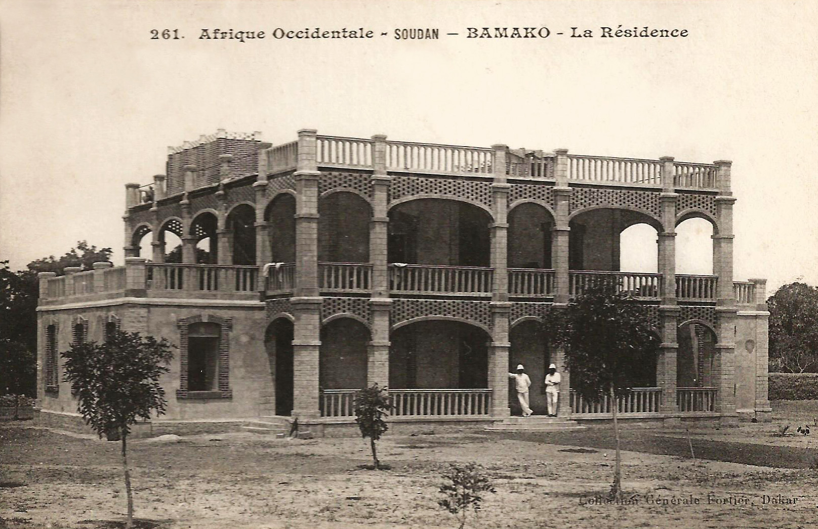 François-Edmond Fortier, Bamako. La Résidence. Afrique Occidentale - Soudan.